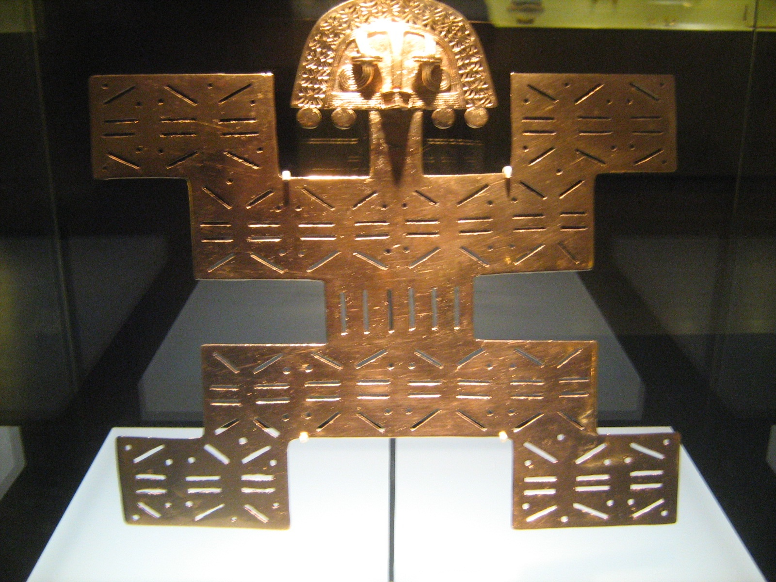 Pectoral Tumbaga 0 - 550 A.D. El Dragón, Calarcá, Quindío Tolima 23,4 x 25,7 cm